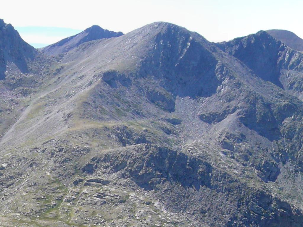 lo Pessó Petit vist des del Tuc des Carants; la Vall de Boí, Alta Ribagorça, Catalunya